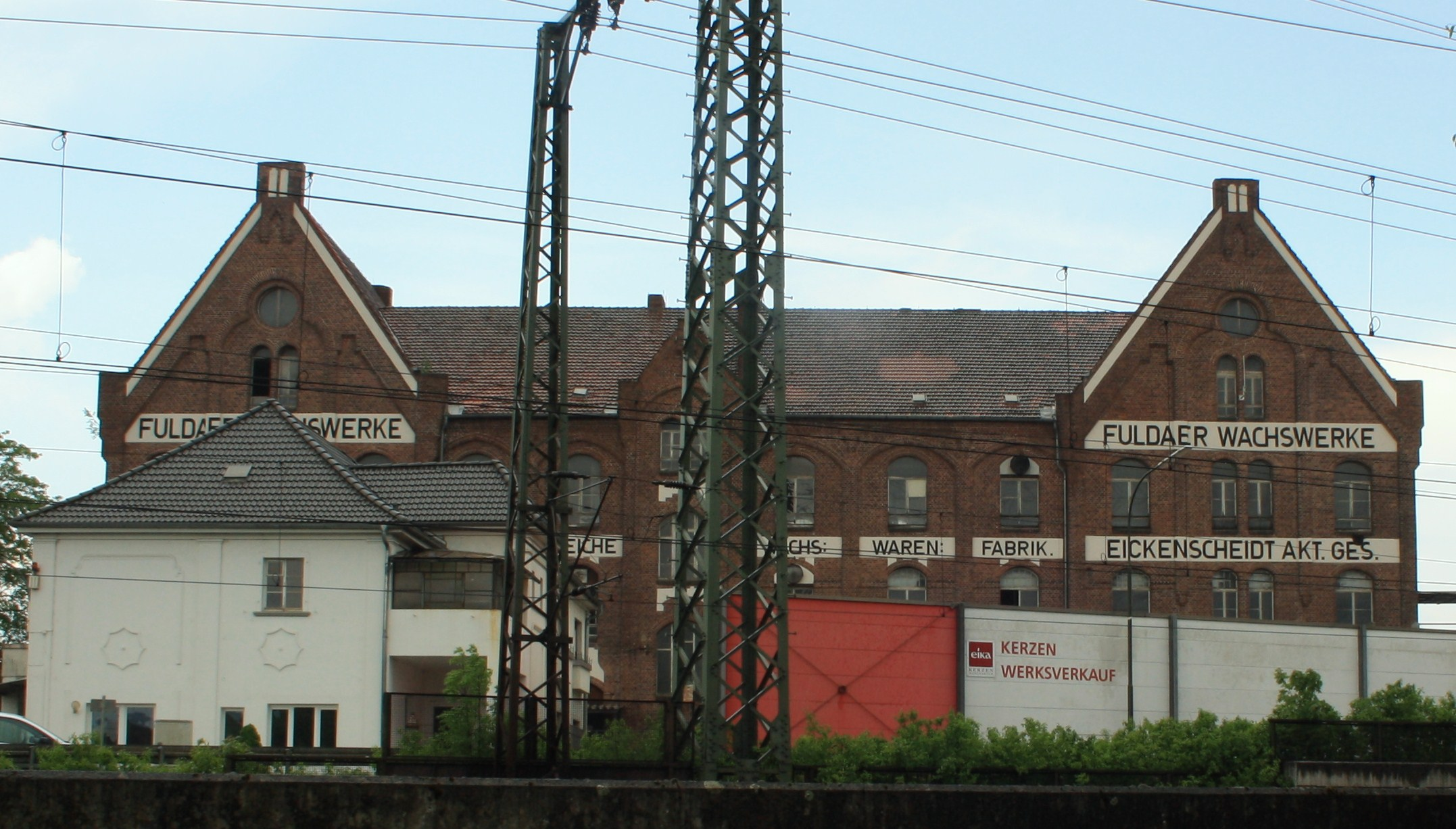 Hauptgebäude der ehemaligen Eika-Wachsfabriken, Kulturdenkmal